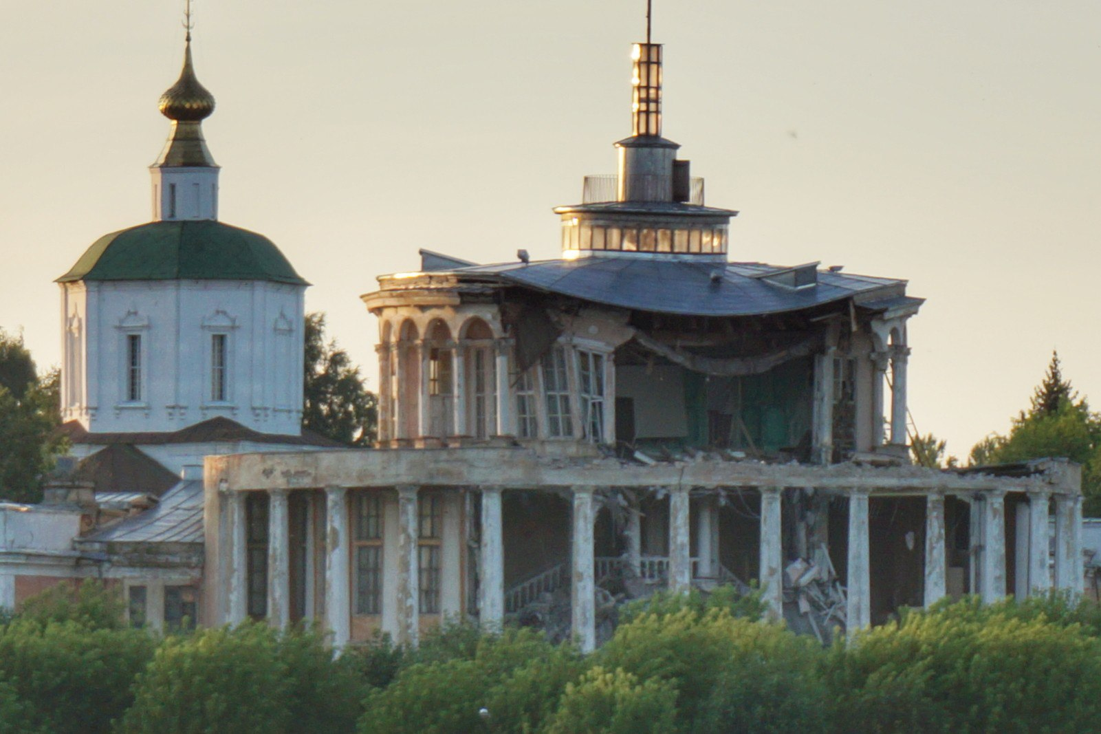 Речной вокзал после обрушения